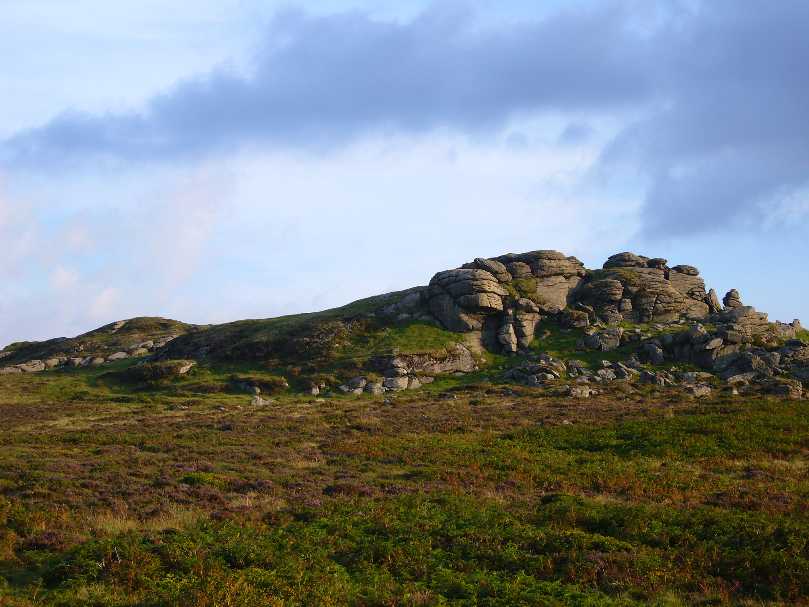 Saddle tor (Dartmoor)